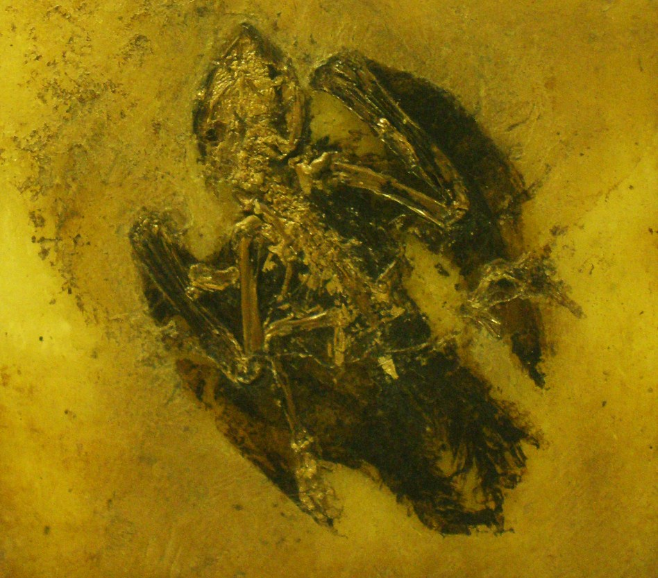 Fossil of Paraprefica, an extinct bird- Took the photo at Senckenberg Museum of Frankfurt